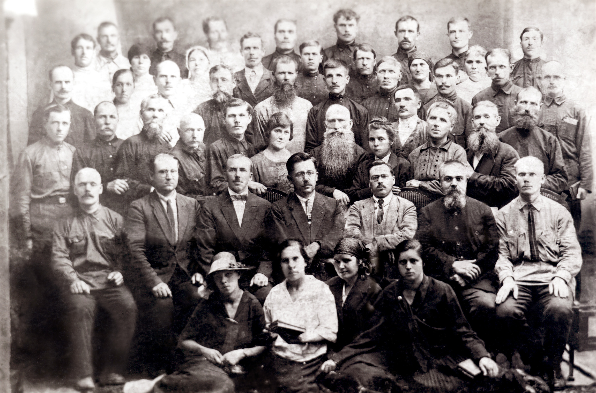 Пятый дальневосточный съезд евангельских христиан, прошедший во Владивостоке в 1926 году. Фото из журнала "Христианин"